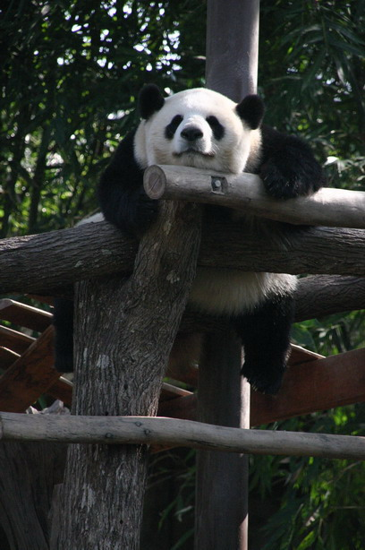 Panda in Chiangmai Zoo